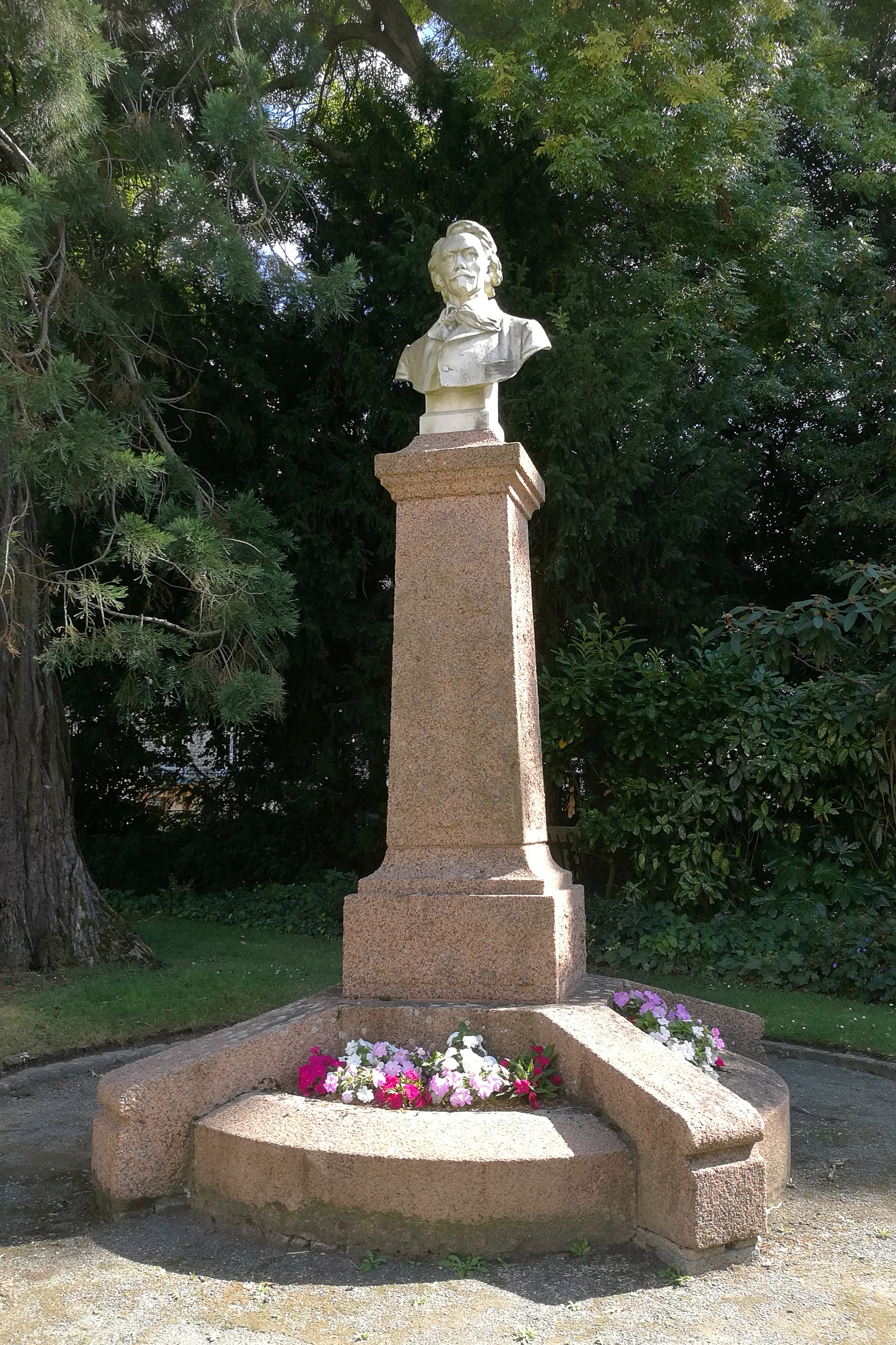 Buste à l'effigie de l'écrivain Auguste de Villiers de l'Isle-Adam, par Élie Le Goff, au parc des Promenades de Saint-Brieuc en Bretagne, France